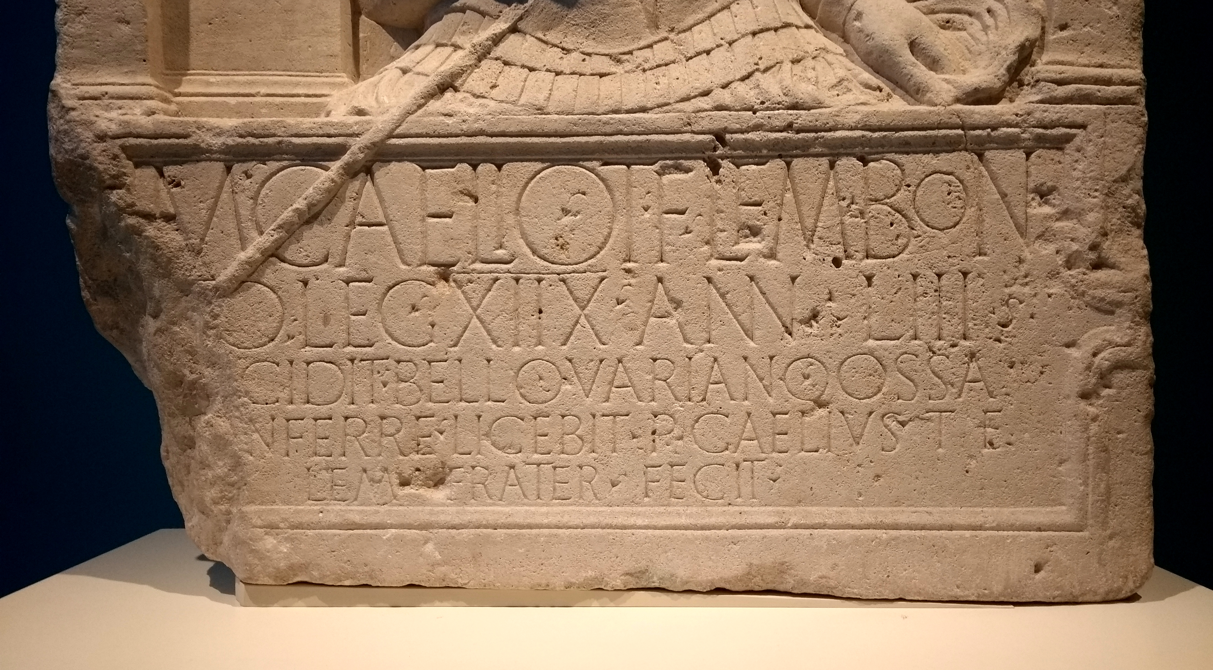 Grabstein des Marcus Caelius, Rheinisches Landesmuseum Bonn, Inschrift